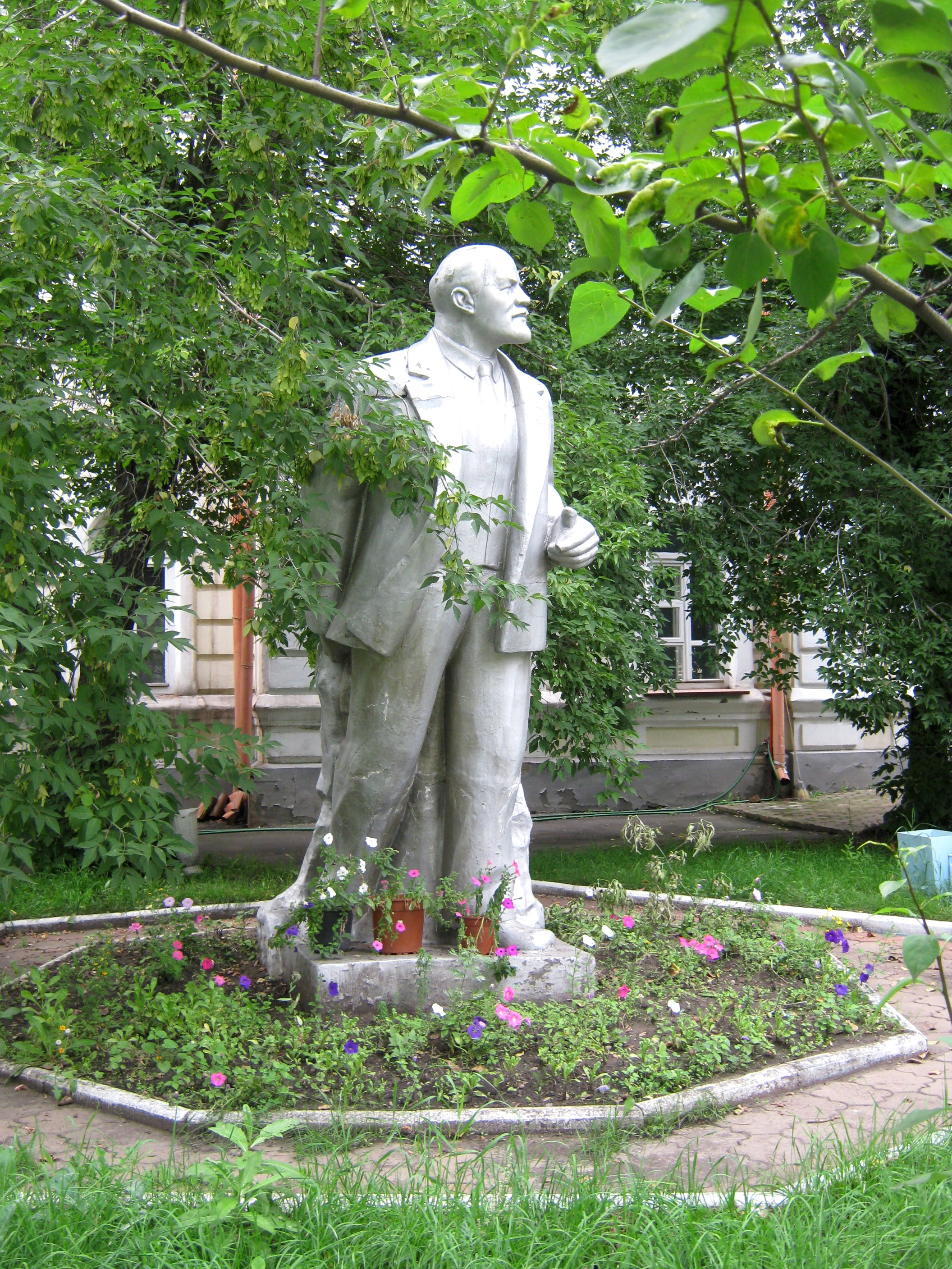 Памятник Ленину у сиропитательного дома Медведниковой в Иркутске